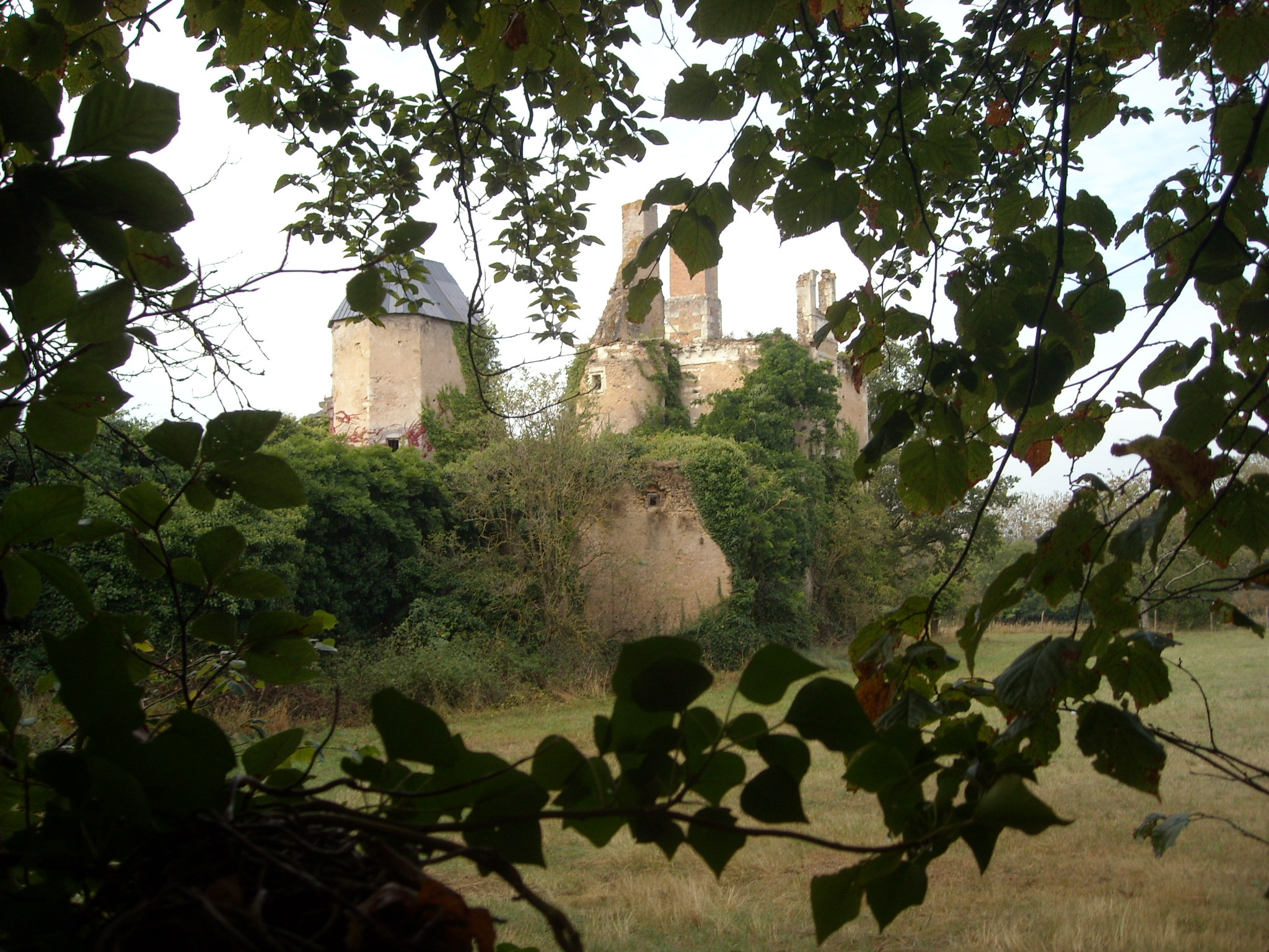 Château de la Buzardière , La Buzardière Inscrit, 1928 .